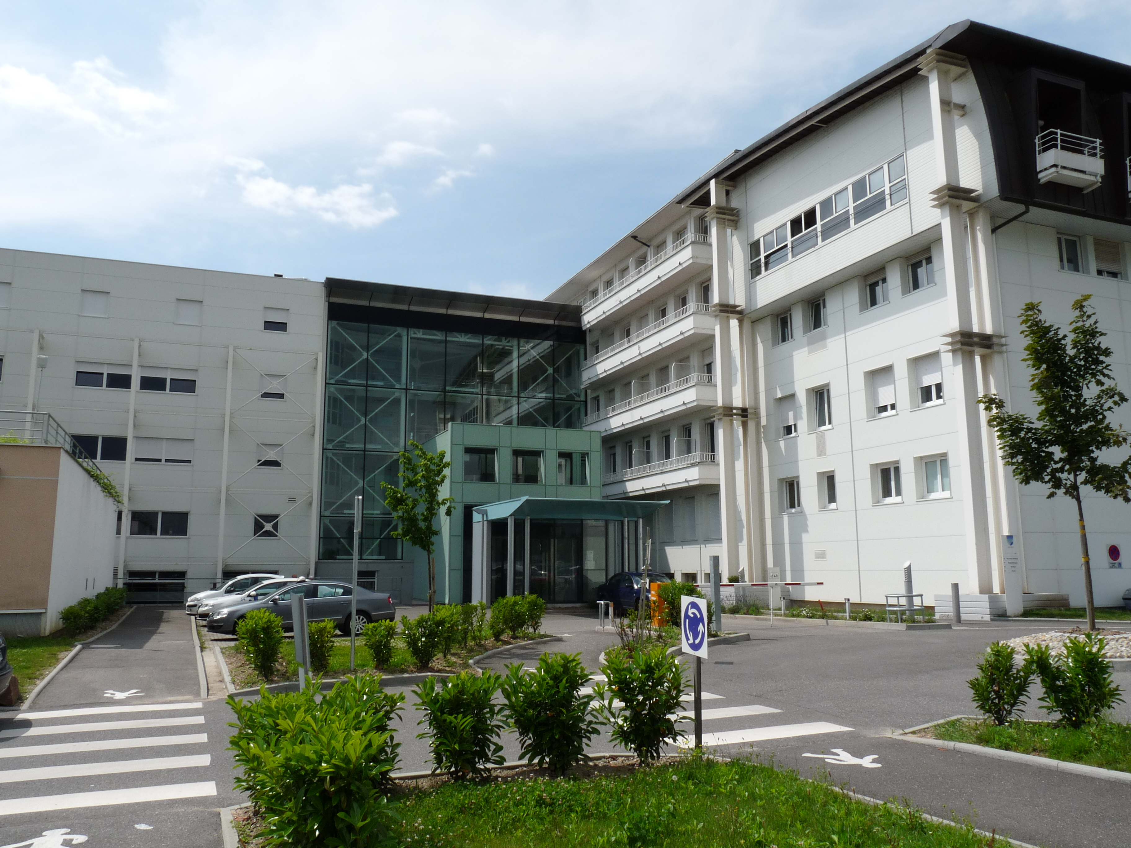 Entrée de la clinique Sainte-Anne à la Robertsau (Strasbourg)